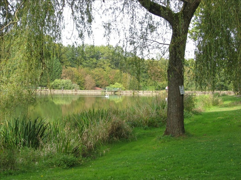 L'étang de Niffonds, à Varenes-Vauzelles